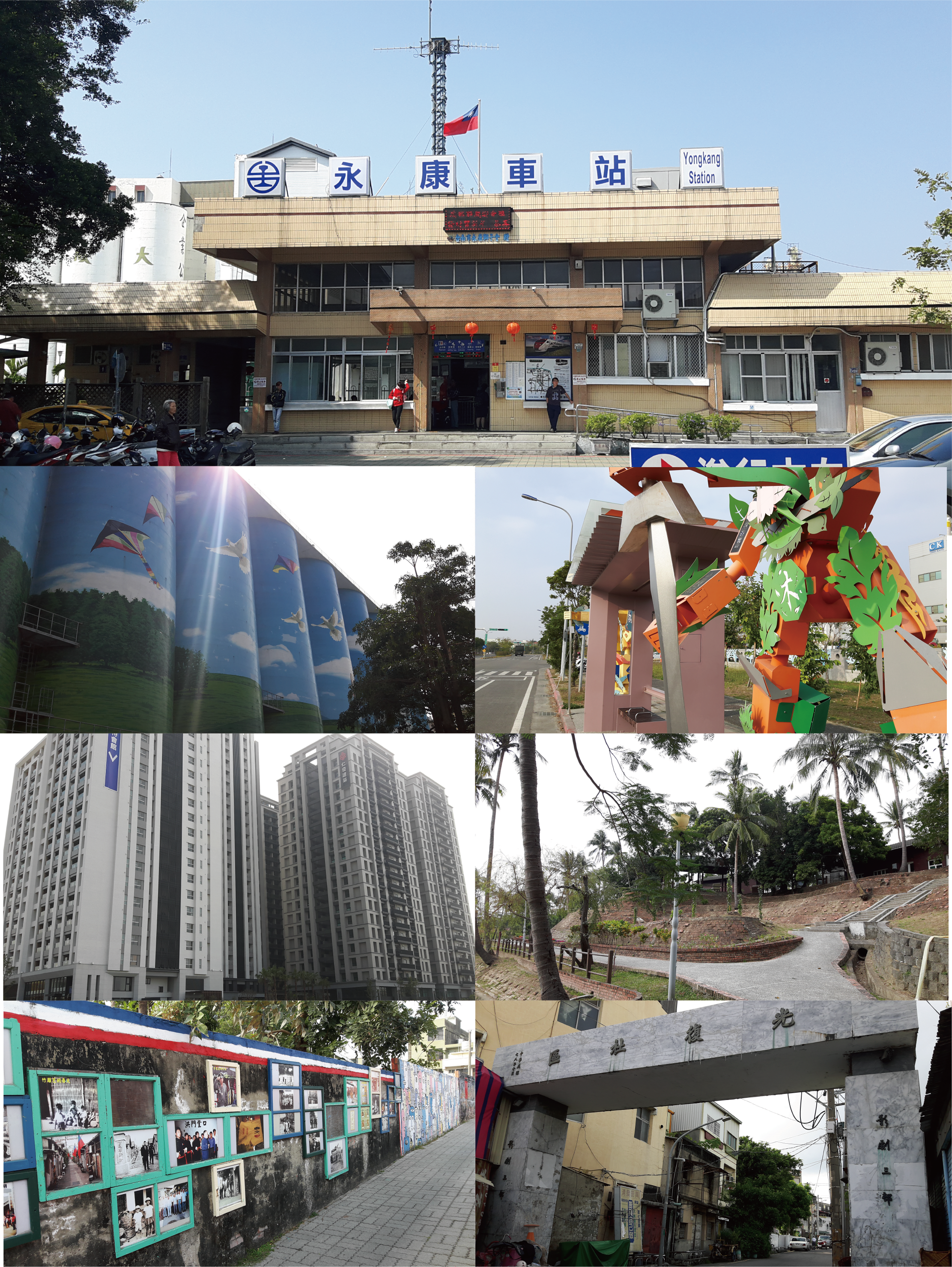 臺南市永康區區內景色：臺灣鐵路管理局永康車站、統一企業總部、永康科技工業園區、東橋重劃區、永康公園、復興老兵文化園區、影劇三村